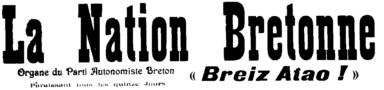 Logo du journal "la Nation Bretonne" publiée par le Parti autonomiste Breton, et reprenant en sous-titre le nom "Breiz Atao", en référence à la revue qu'elle remplace.